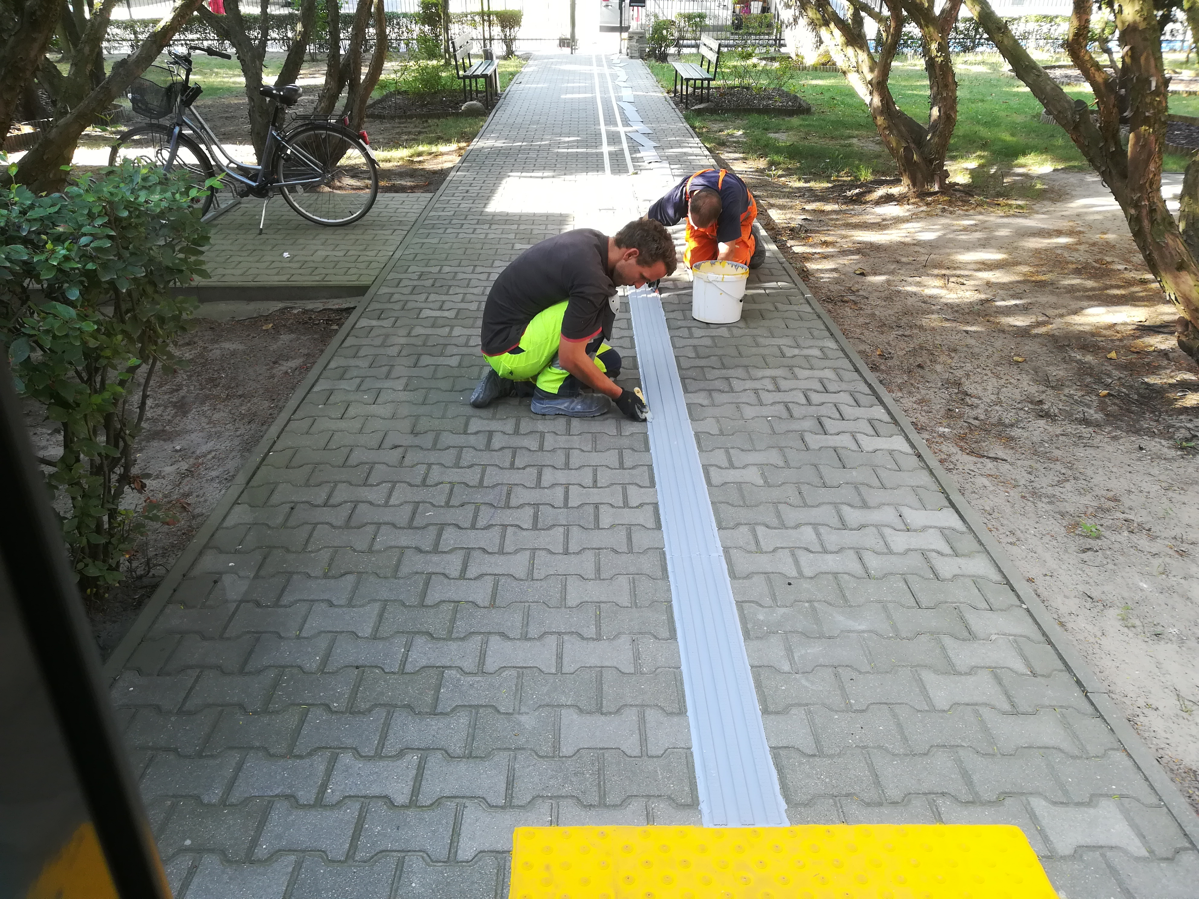 Oznakowania poziome na ul. Cześnikowskiej w Poznaniu.